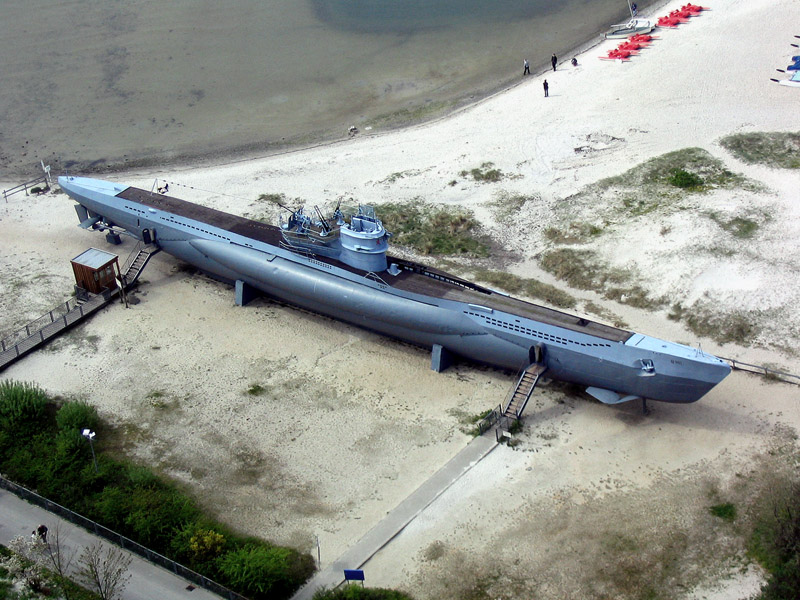 U-995 (Typ VII C/41) am Fuße des Marineehrenmals in Laboe , aufgenommen von der Plattform des Marineehrenmals